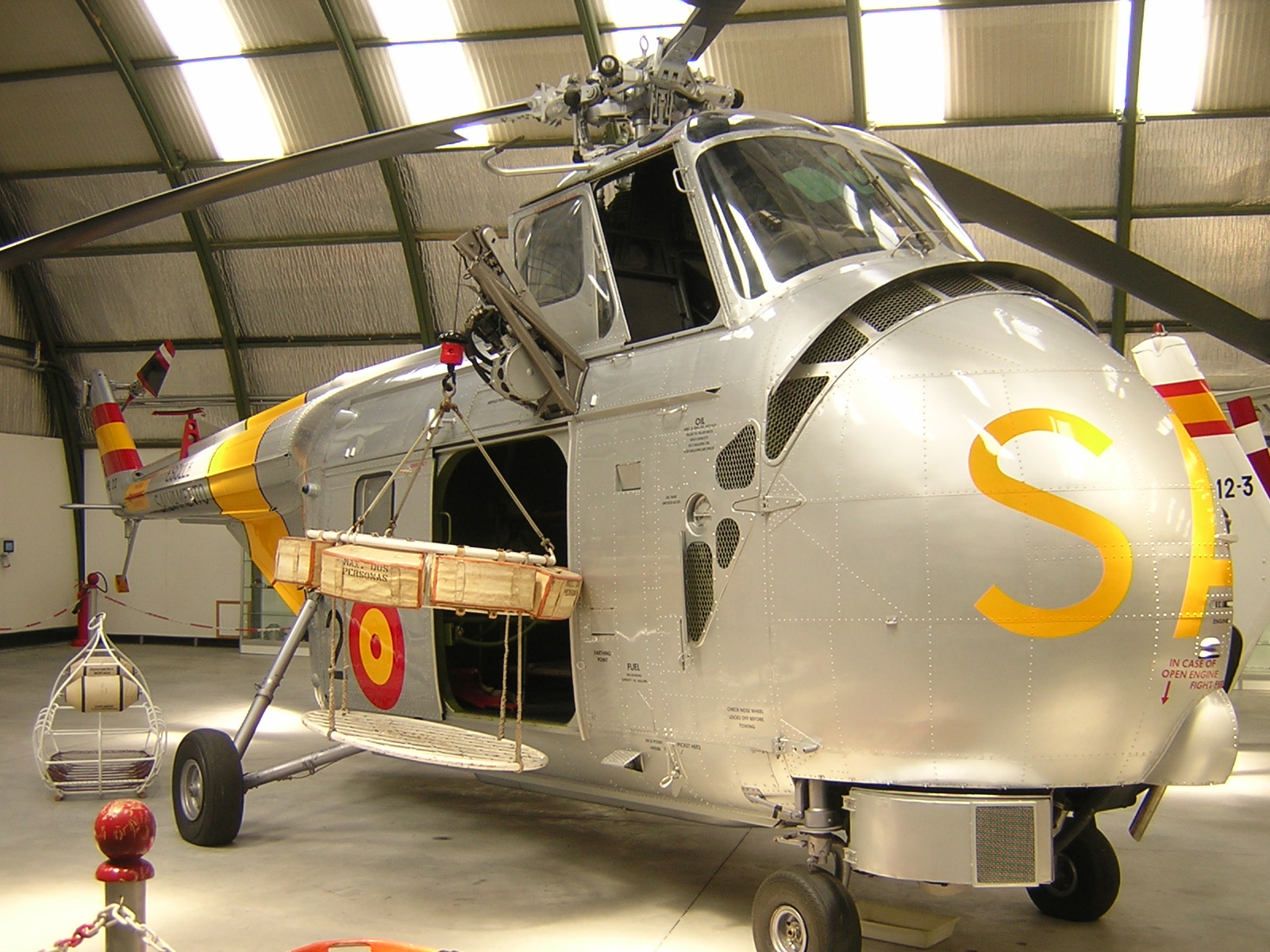 Un Sikorsky Westland S-55, antiguamente perteneciente al Ejército del Aire de España, ahora expuesto en el Museo del Aire en Cuatro Vientos, Madrid.